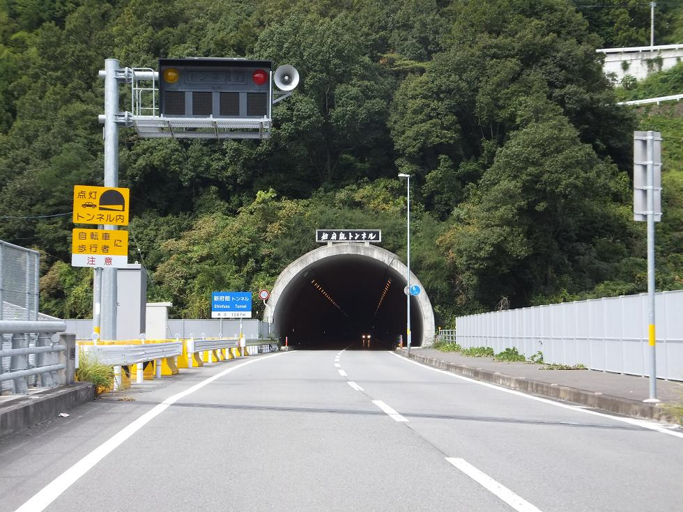 国道438号新府能トンネル（徳島県名東郡佐那河内村）